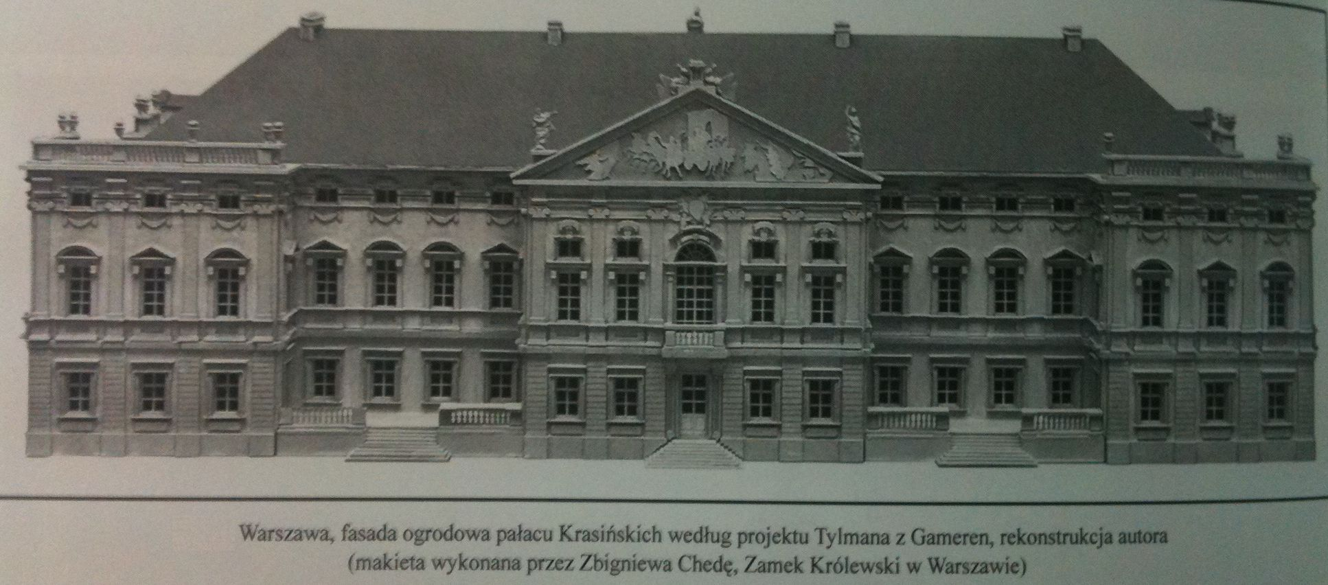 Elewacja ogrodowa Pałacu Krasińskich w Warszawie wg stanu z czasów Tylmana z Gameren